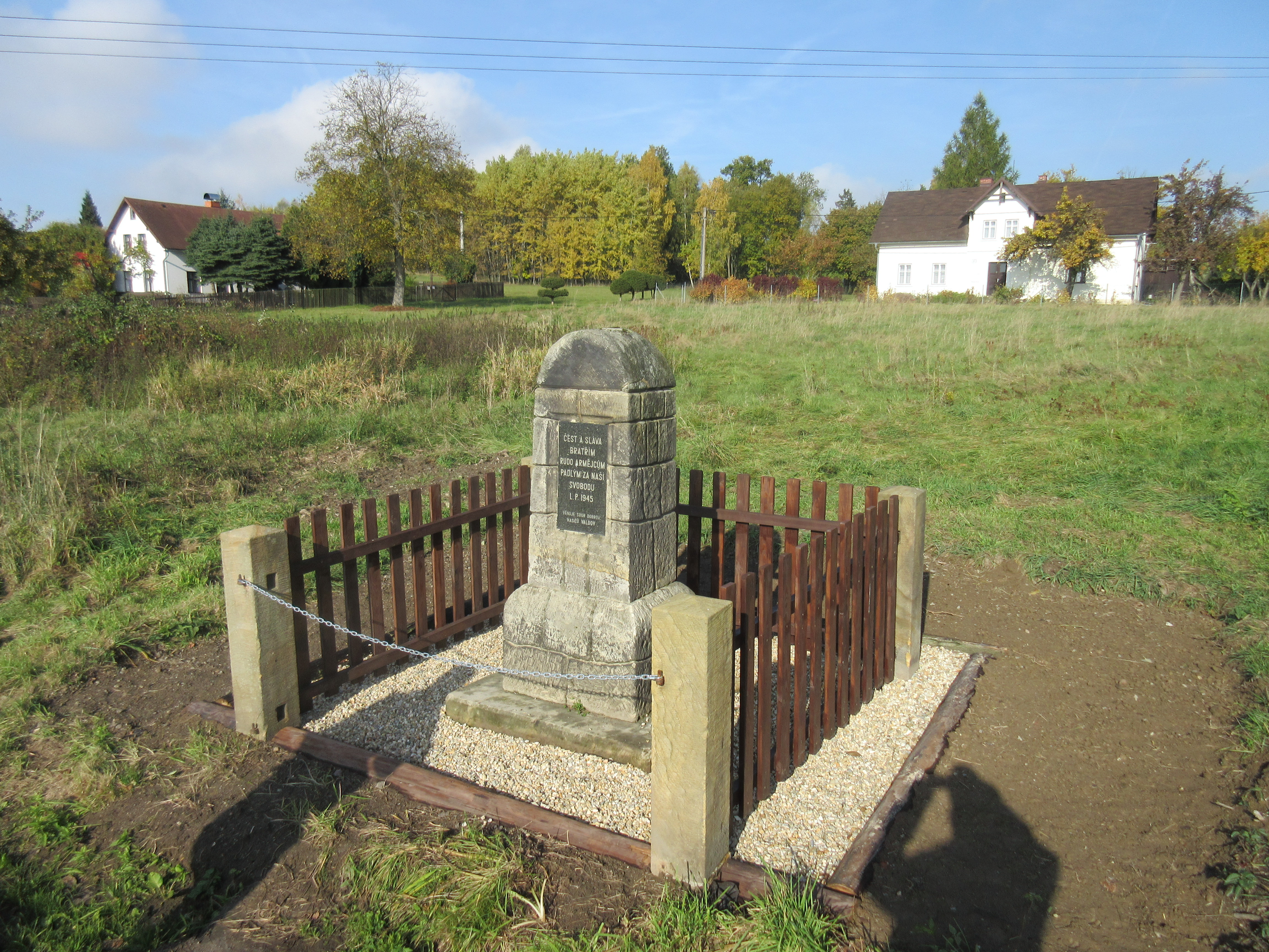 Pomníček ve Valdově